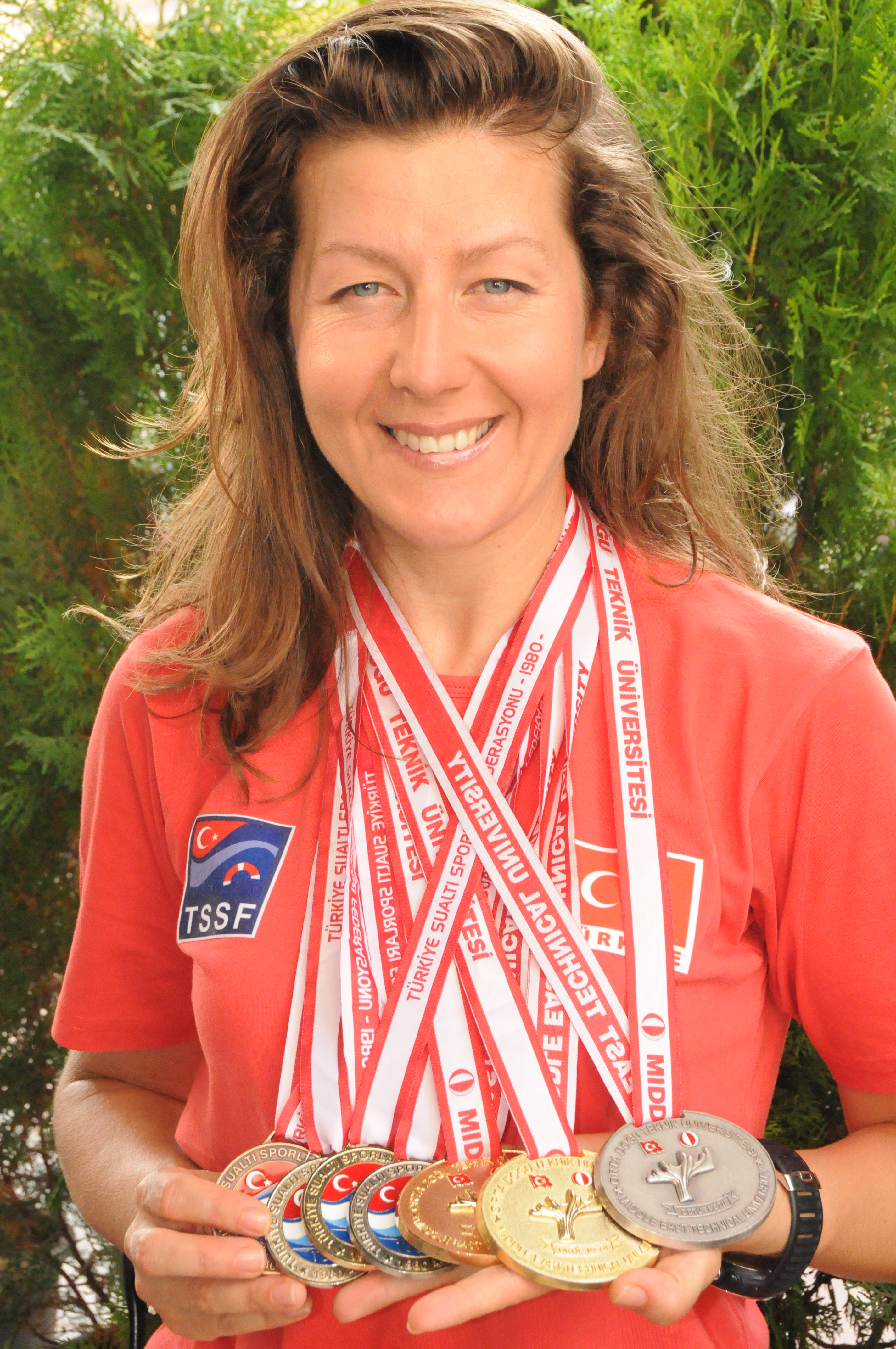 Serbest dalıcı ve Milli Sporcu Birgül Erken.